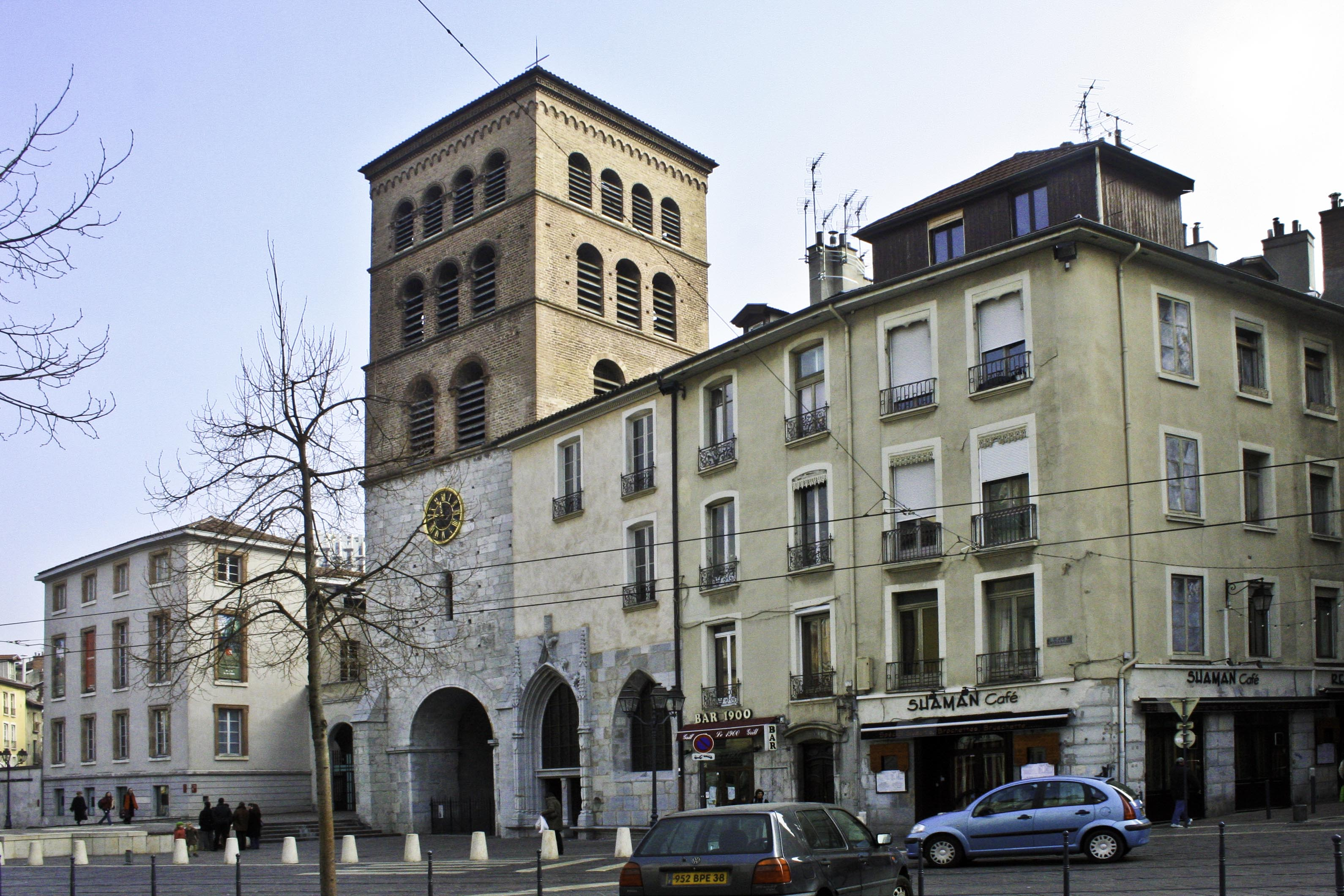 Cathédrale Notre-Dame de Grenoble (Isère, France). Clocher-porche